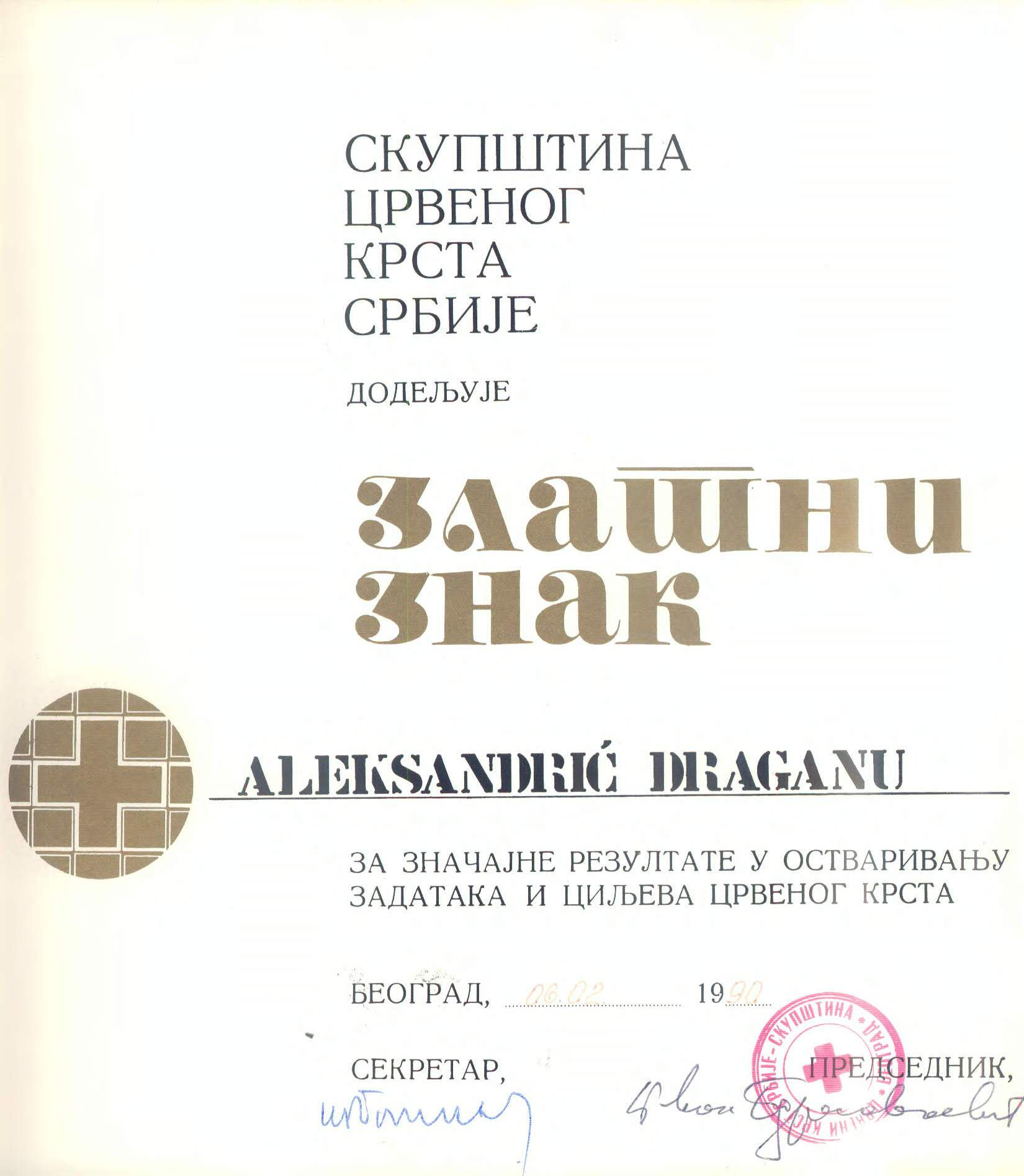 fotografija priznanja Draganu Aleksandriću za humanitarni rad